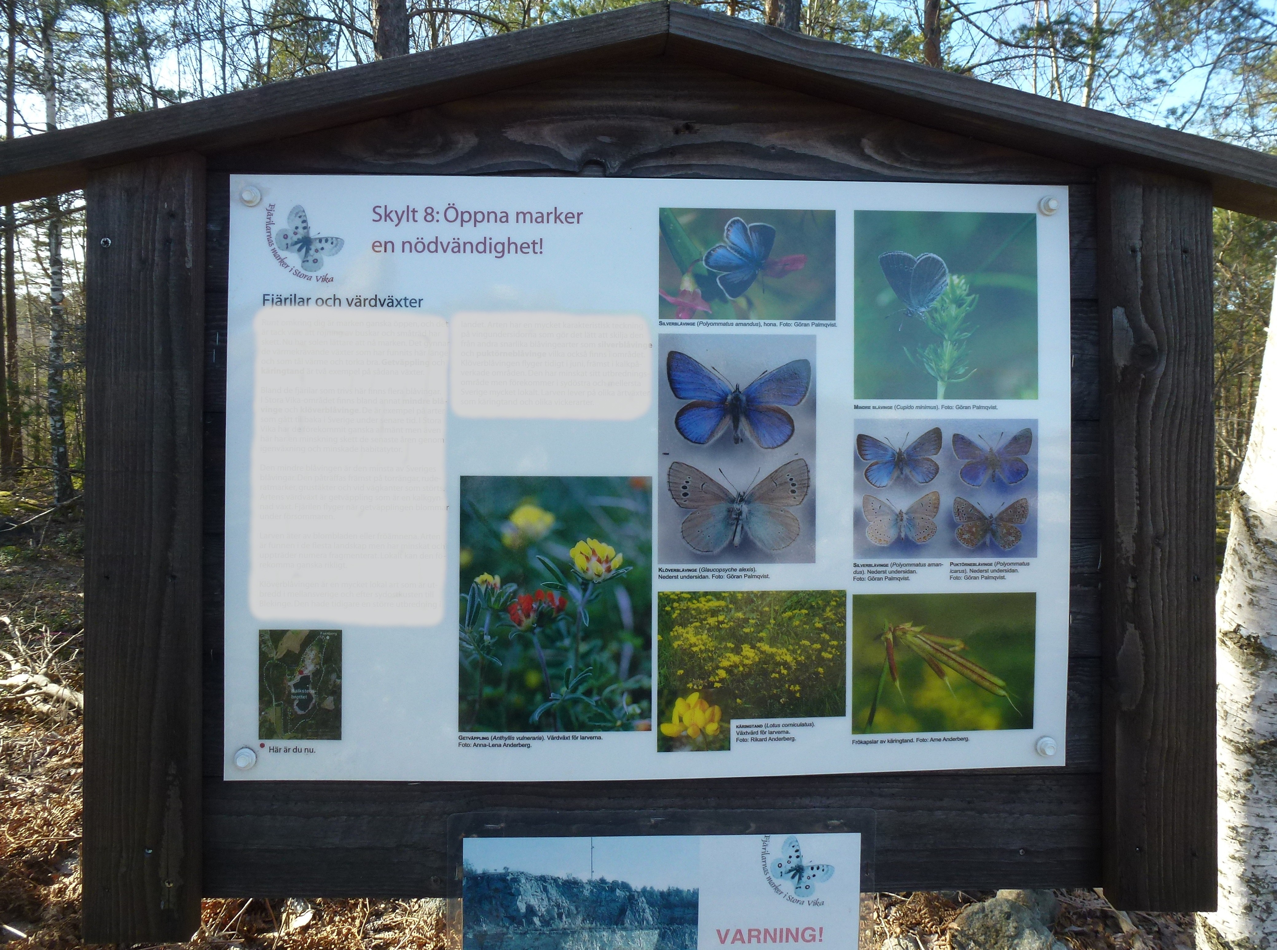 På Fjärilsstigen vid Stora Vika. Fotografierna är taget av Göran Palmqvist och finns på en stadigvarande informationstavla (utomhus) vid stigen.